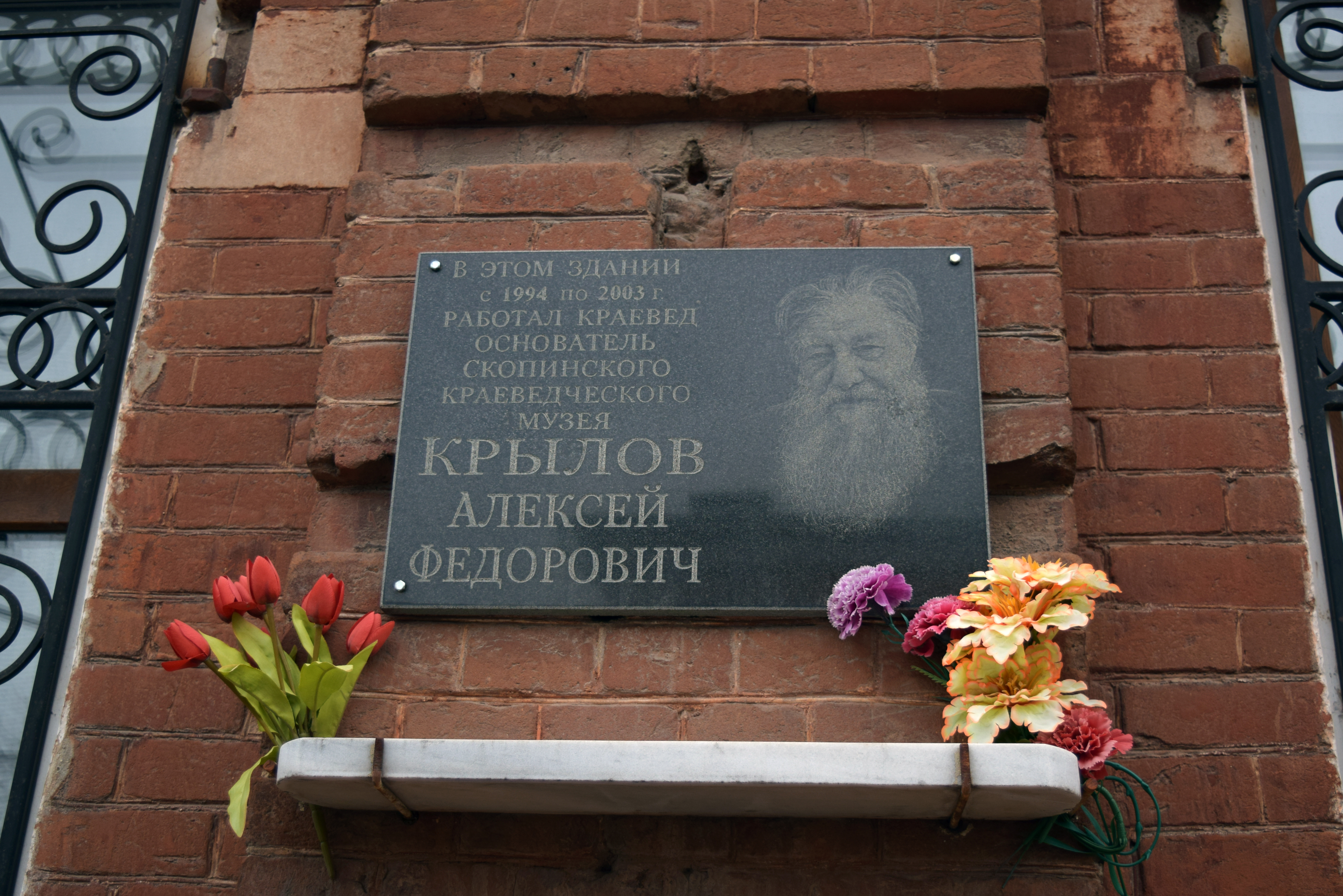 Находится на здании краеведческого музея г.Скопина Рязанской области